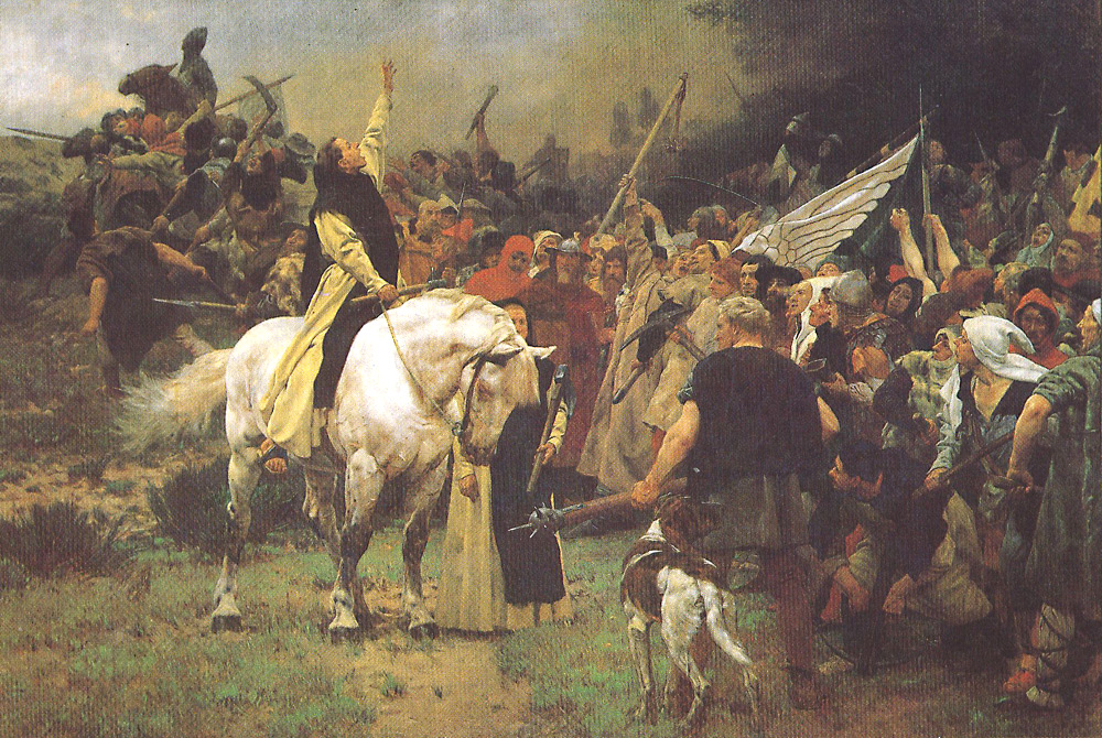 Peter Jansens Monumentalgemälde Schlacht bei Worringen, Auftragsarbeit von 1889, hängt an der nördlichen Wand des Jan-Wellem-Saals im Historischen Rathaus Düsseldorf. Geschenk von Karl Weiler im Jahre in 1892 an die städtische Gemäldegalerie.